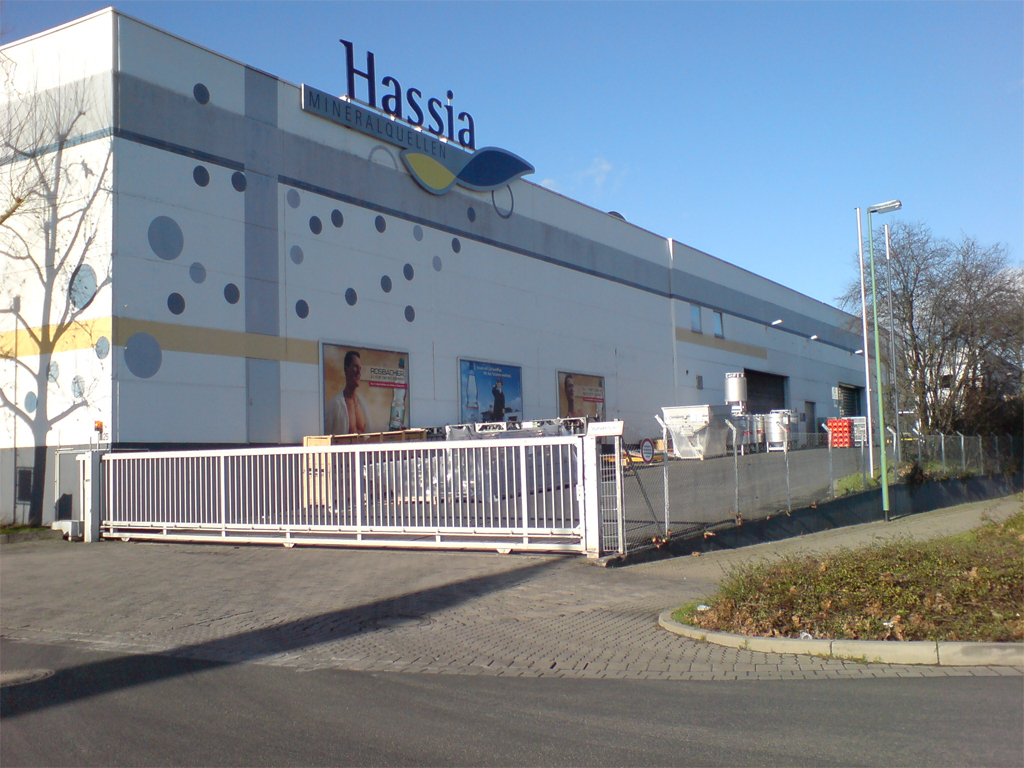 Firma Hassia Mineralquellen GmbH & Co. KG in Bad Vilbel